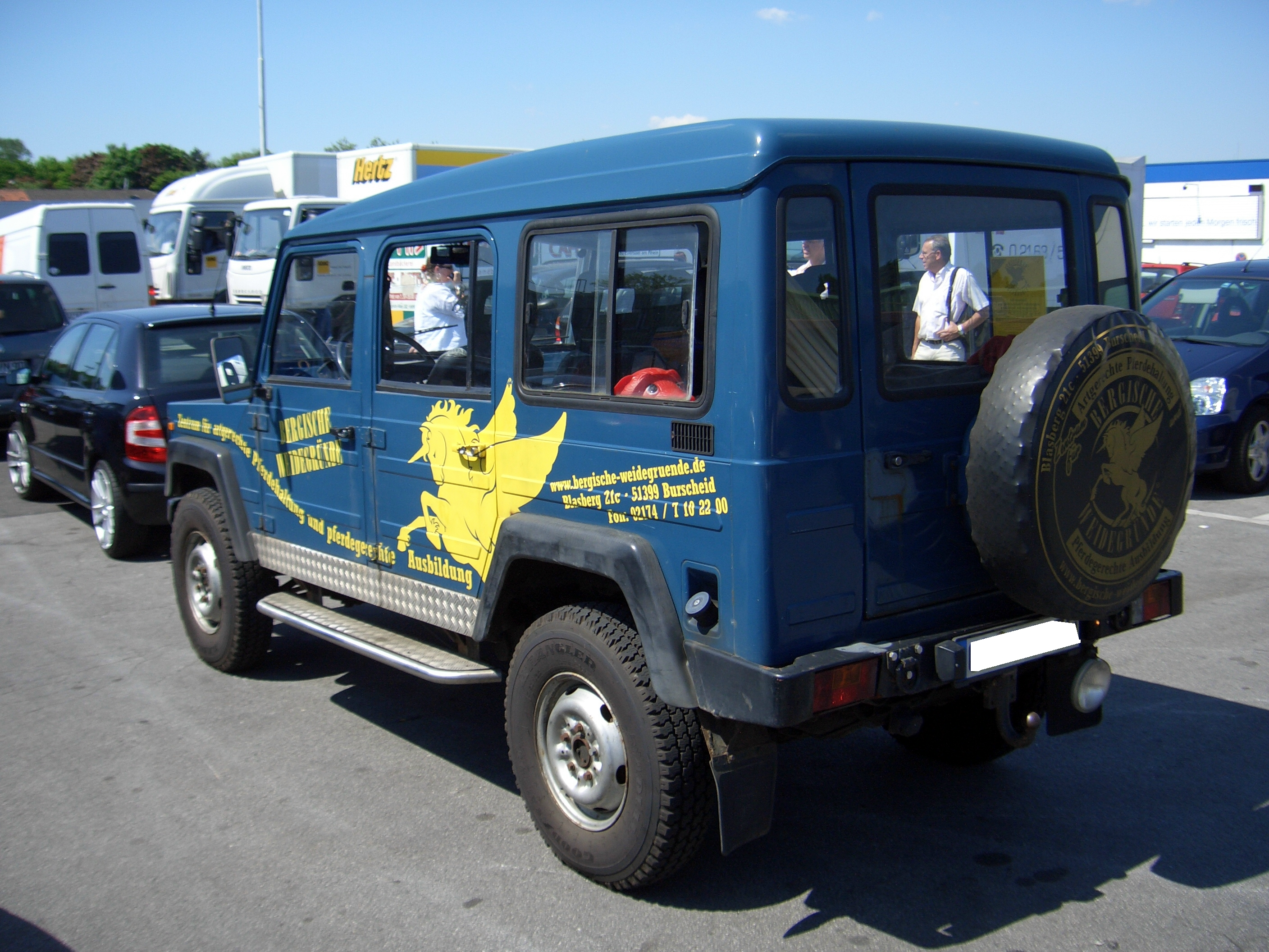 Bajaj Tempo TEMPO TRAX JUDO 4x4, seen in Duesseldorf, Germany